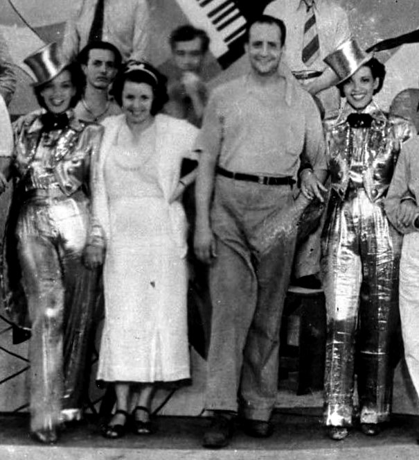 Ademar Gonzaga (centro) com Carmen Miranda (à esquerda) e sua irmã, Aurora Miranda (à direita).